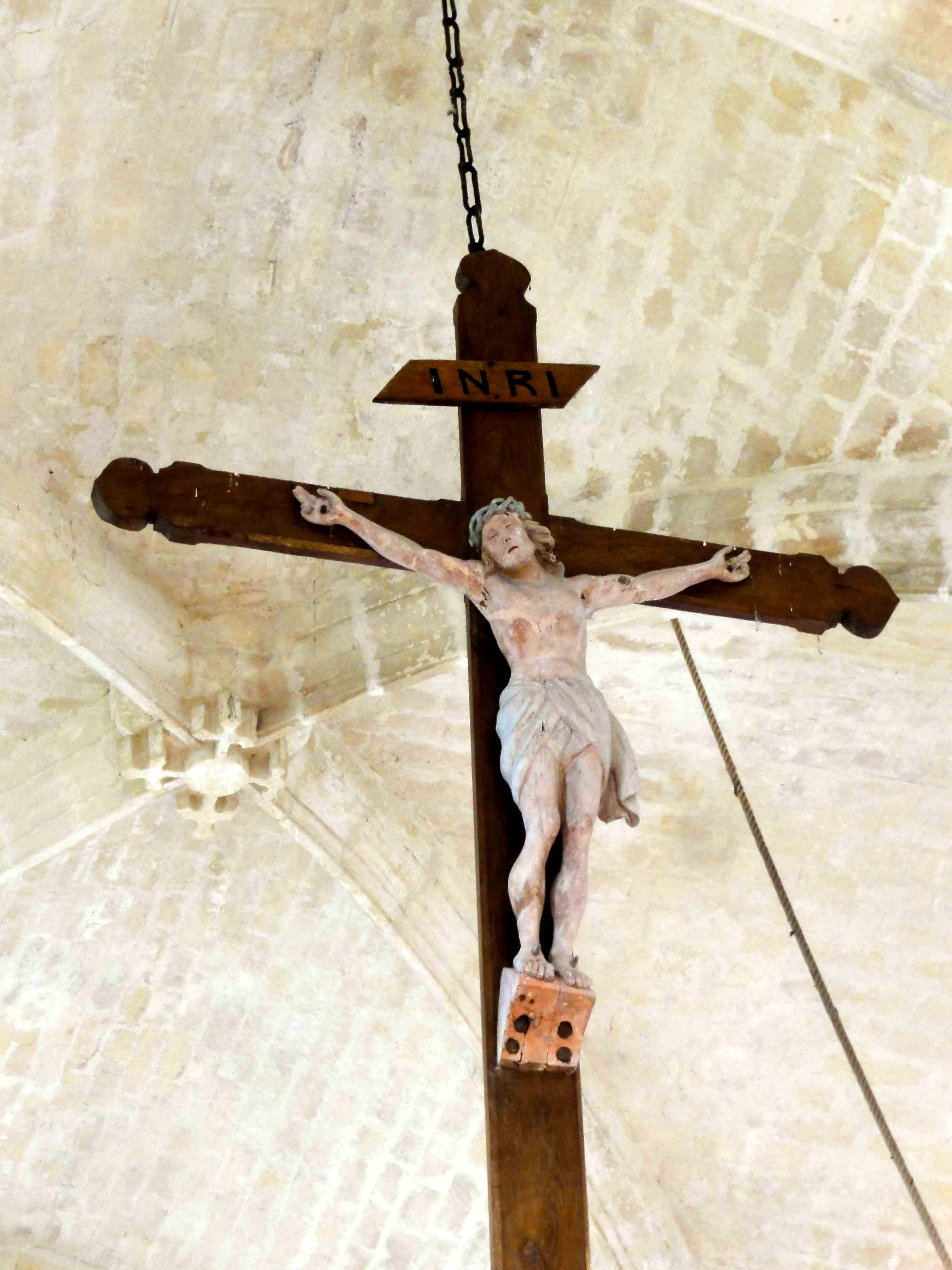 Nef, Christ en croix subsistant de la poutre de gloire.